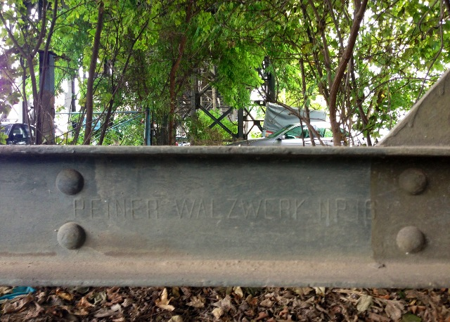 Stahlträger im Peiner Walzwerk hergestellt, Chemnitz Viadukt